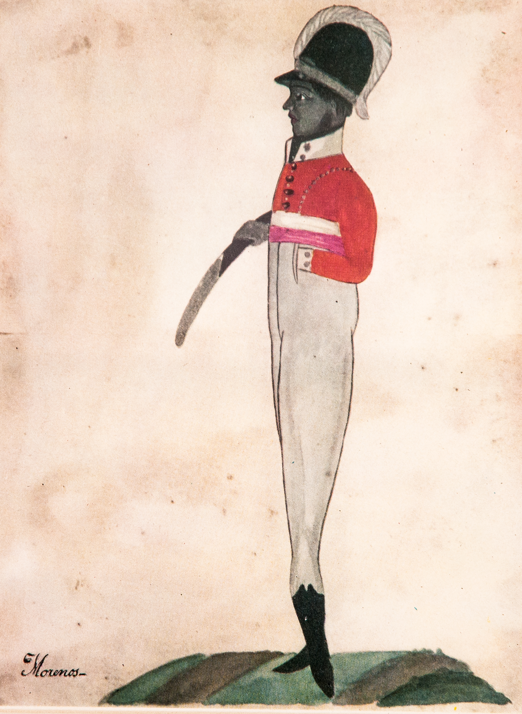 Serie de acuarelas originales de la época de la Independencia de la Argentina de soldados de los Regimientos Patriotas.